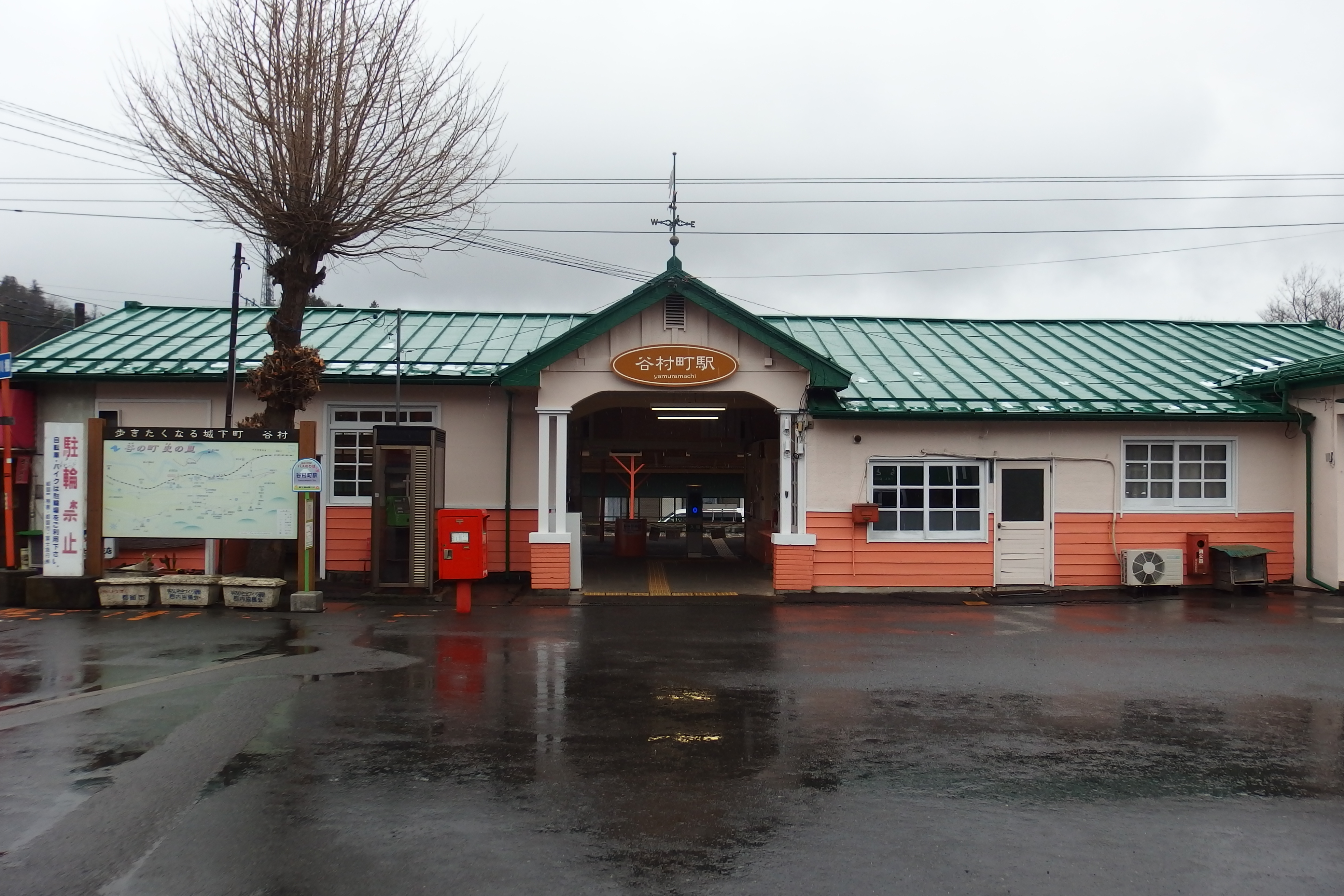 谷村町駅（2017年3月26日撮影）